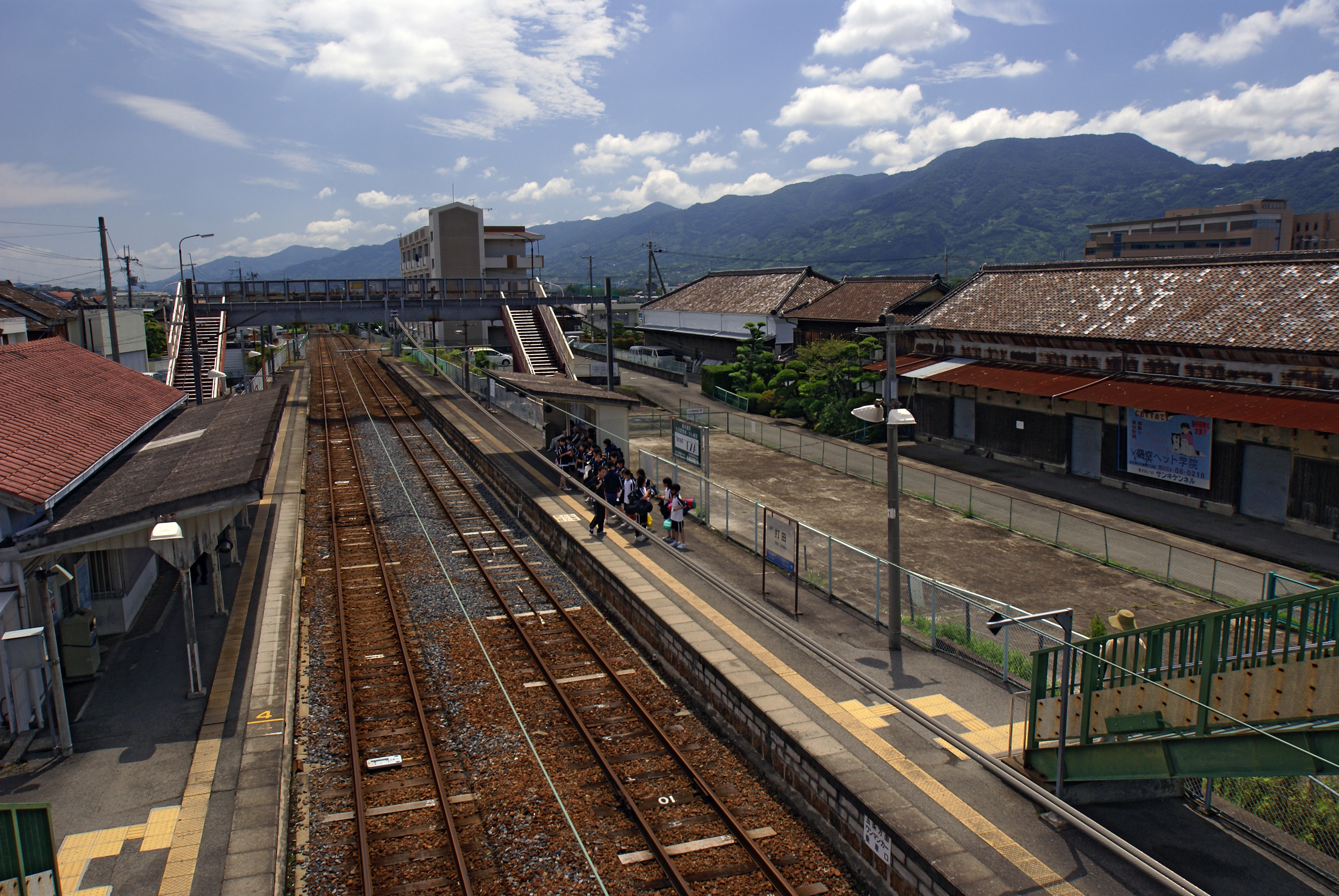 Uchita station in Kinokawa, Wakayama prefecture, Japan